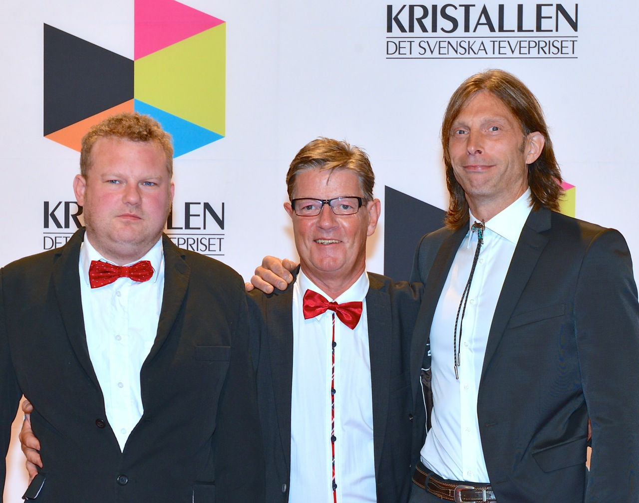 Morgan Karlsson, Boris Lennerhov och Ola-Conny Wallgren från tv-serien "Ullared" och "En stark resa med Morgan & Ola-Conny" på Kristallen-galan den 30 augusti 2013.